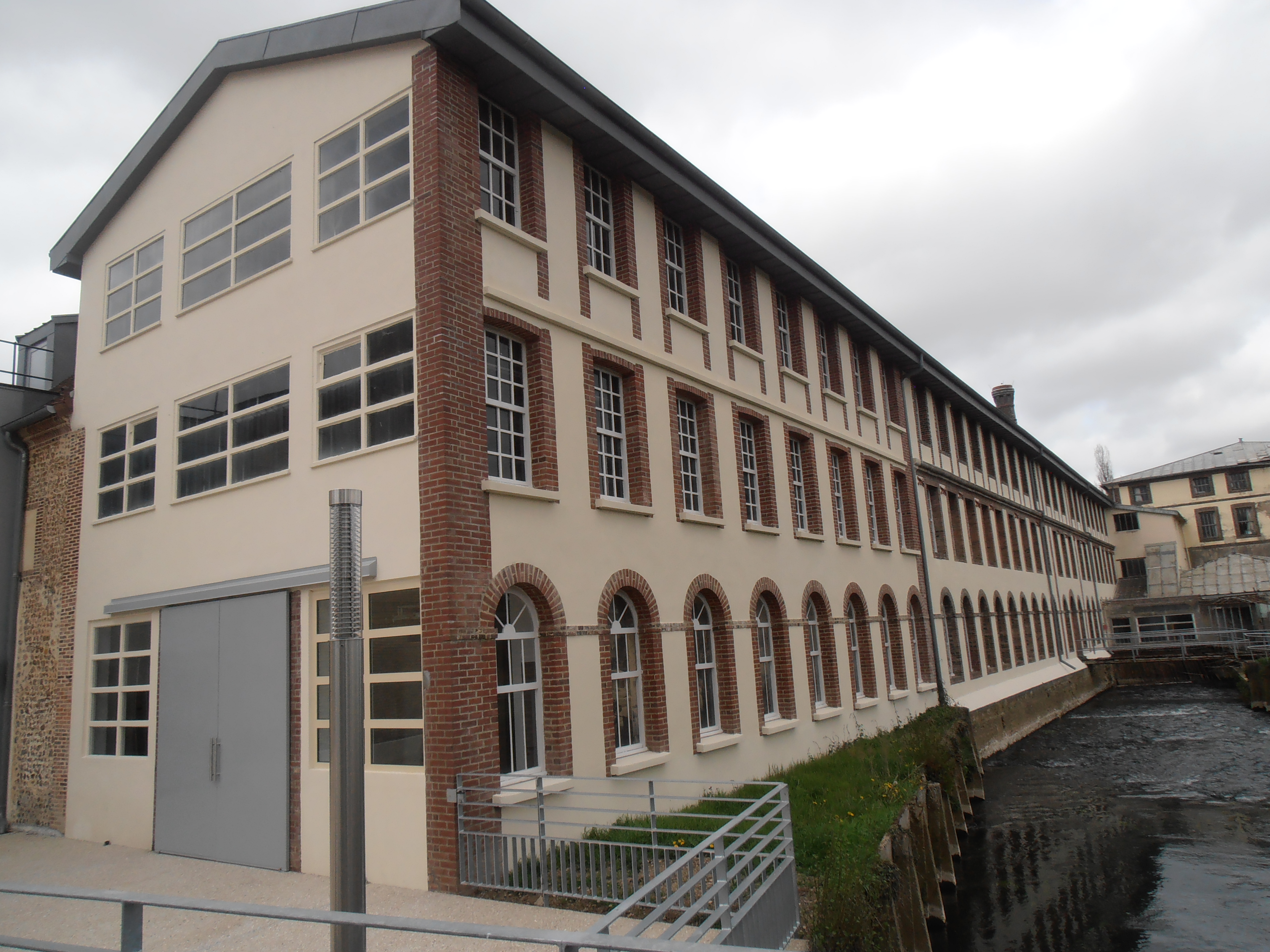 Orne, Saint-Sulpice-sur-Risle, Entrée manufacture Bohin et de son musée : ISMH 1995 Tréfilerie d'aiguilles et d'épingles reconstruite en grande partie vers 1880 par Benjamin Bohin